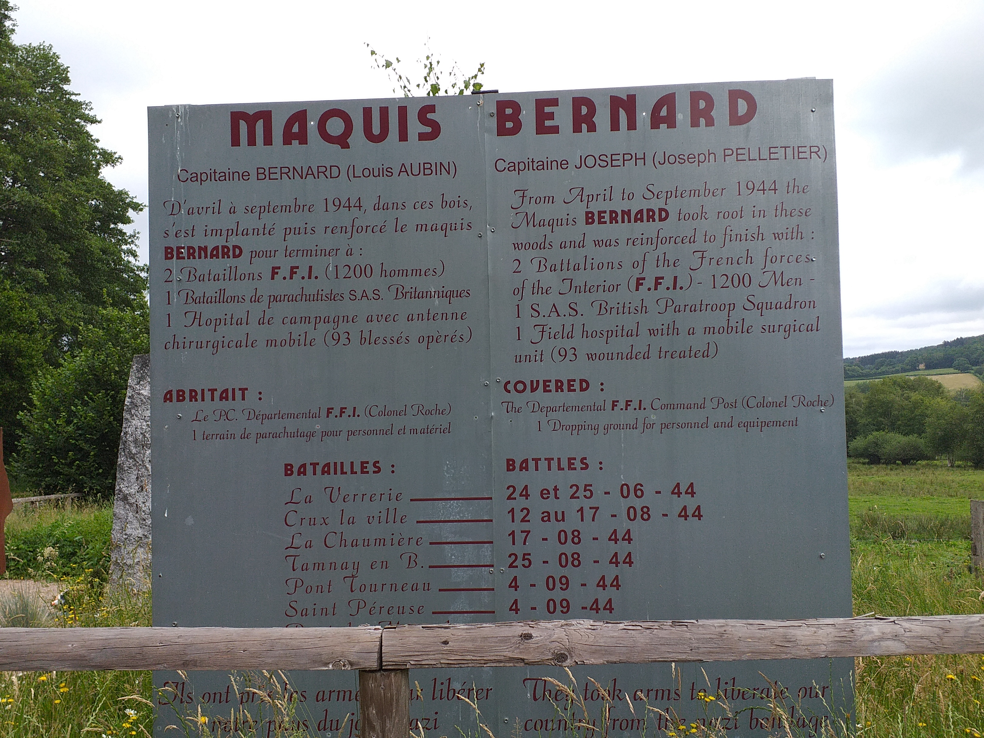 Panneau présent sur les terres du Maquis Bernard, photo prise lors d'une randonnée